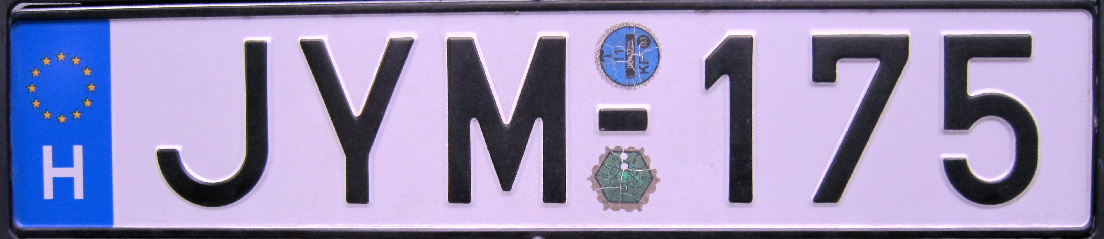 kentekenplaat Hongarije nieuw